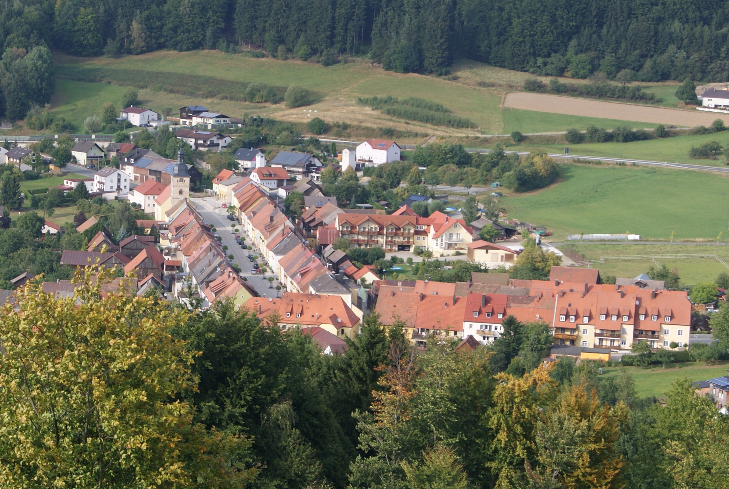 Blick vom Schlossberg auf WaldeckThis is a photograph of an architectural monument.